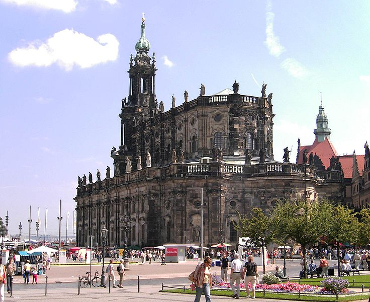 Catedrala Sfânta Treime din Dresda